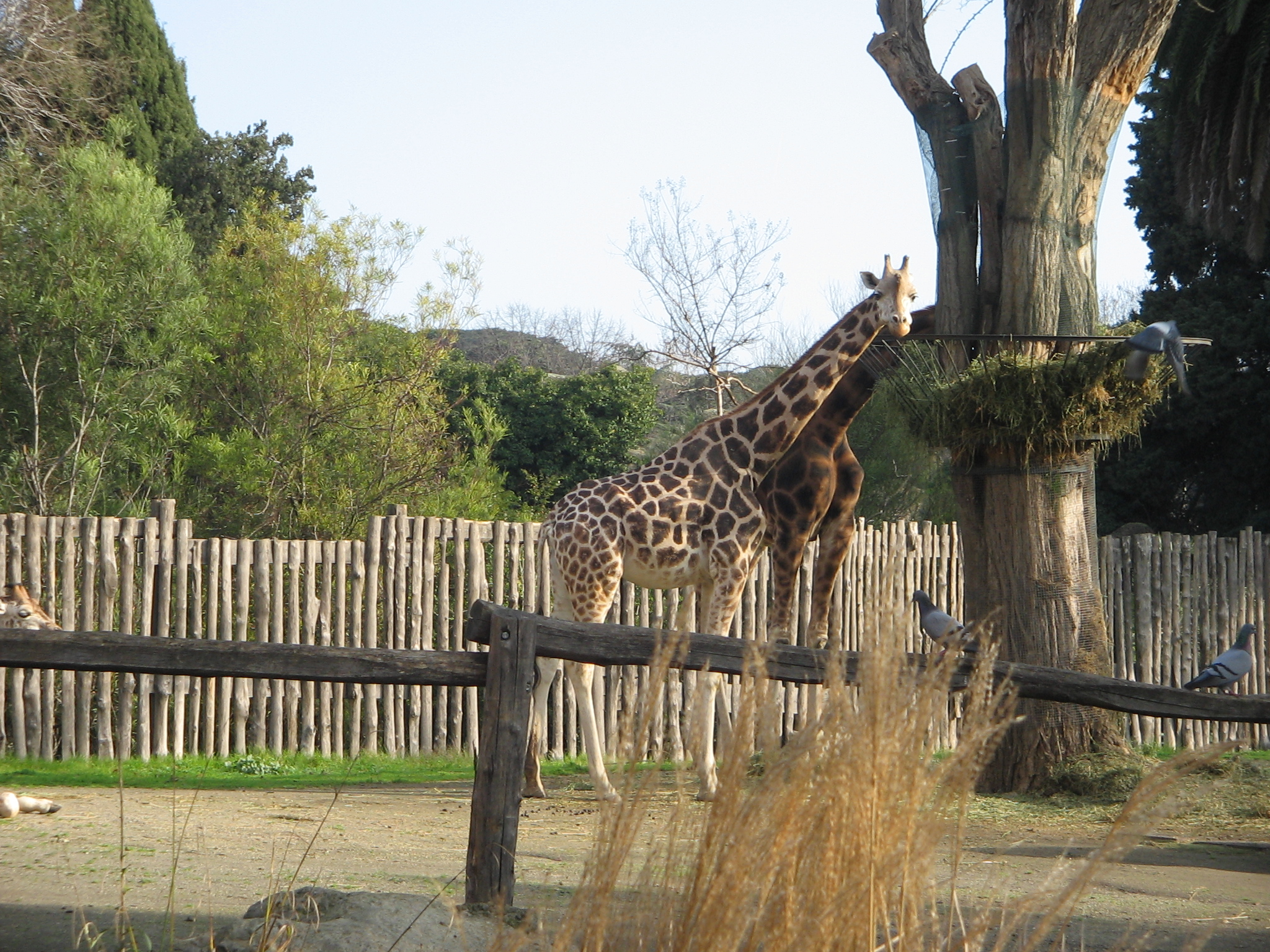 Casa delle giraffe al bioparco di Roma